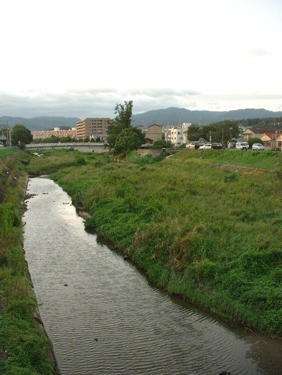 芥川 高槻市川西町1丁目 国道171号から上流方を望む